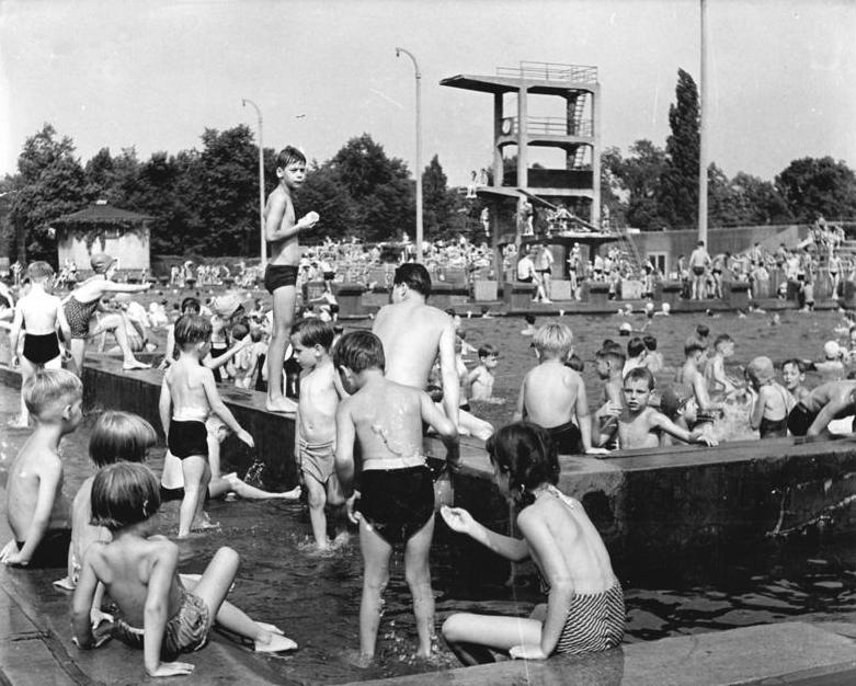 Dresden, Freibad, Arnoldbad Zentralbild Weidauer äl-Ku 14.8.1960 Dresdener Arnoldbad stark besucht Die Wasserratten kommen in diesem Sommer nicht auf ihre Rechnung. Sobald jedoch die Quecksilbersäule einmal über 25 Grad klettert, die Sonne mal für einen Tag makellos vom blauen Himmel strahlt, sind die Bäder überfüllt und es scheint so, als holten die Badelustigen an einem Tage nach, was sie in Wochen versäumten. Das Arnoldbad in der Dresdener Innenstadt zählt dann 5-6000 Badegäste.